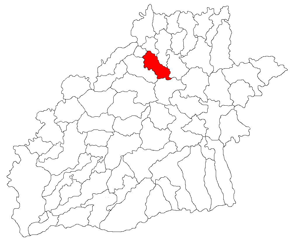 Categorie:Hărţi ale judeţului Sibiu